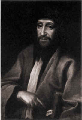 Zvi Ashkenazi (1660-1718), Rabbi of Amsterdam.